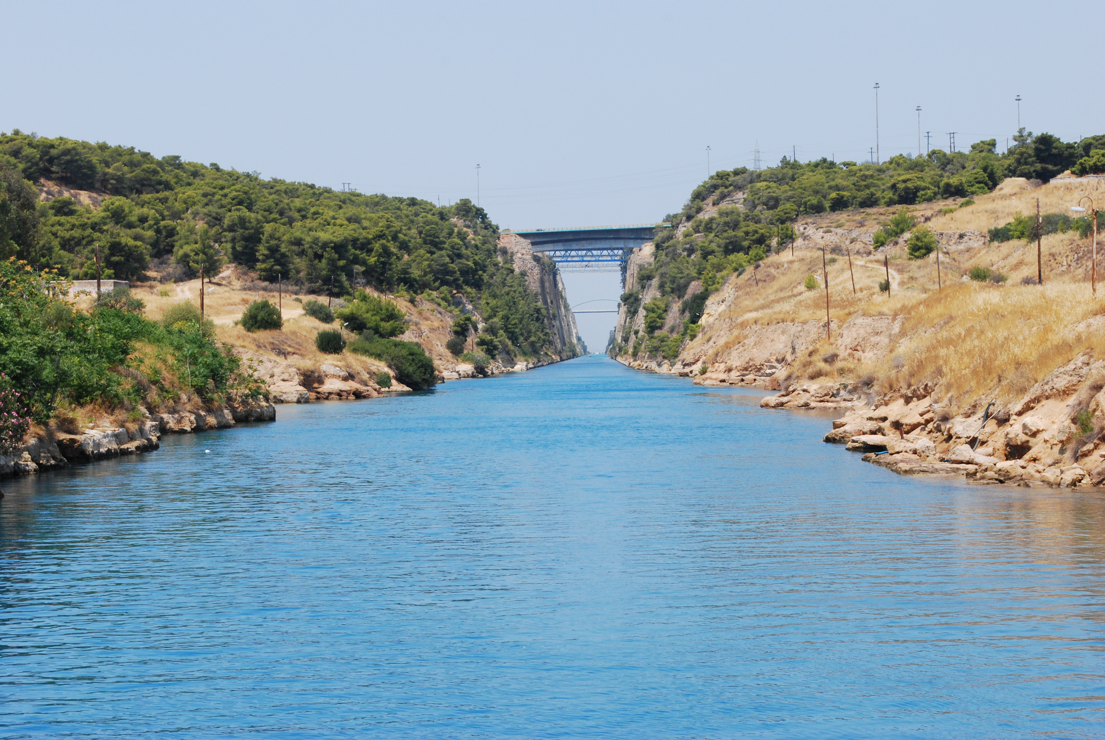 Vue du canal de Corinthe.